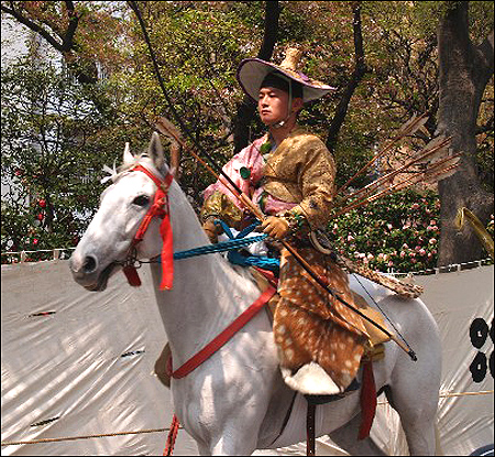 Kyudo Yabusame.